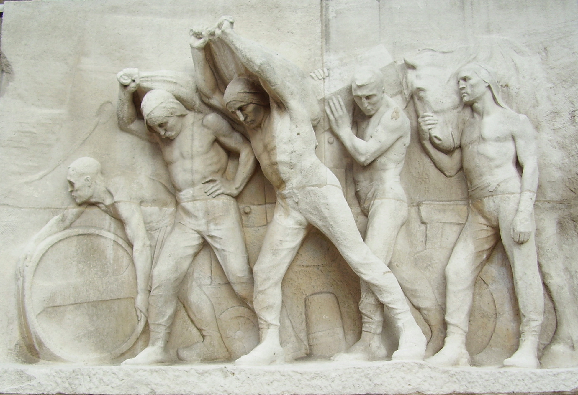 Monument au Travail, Bruxelles - Les Dockers, Constantin Meunier